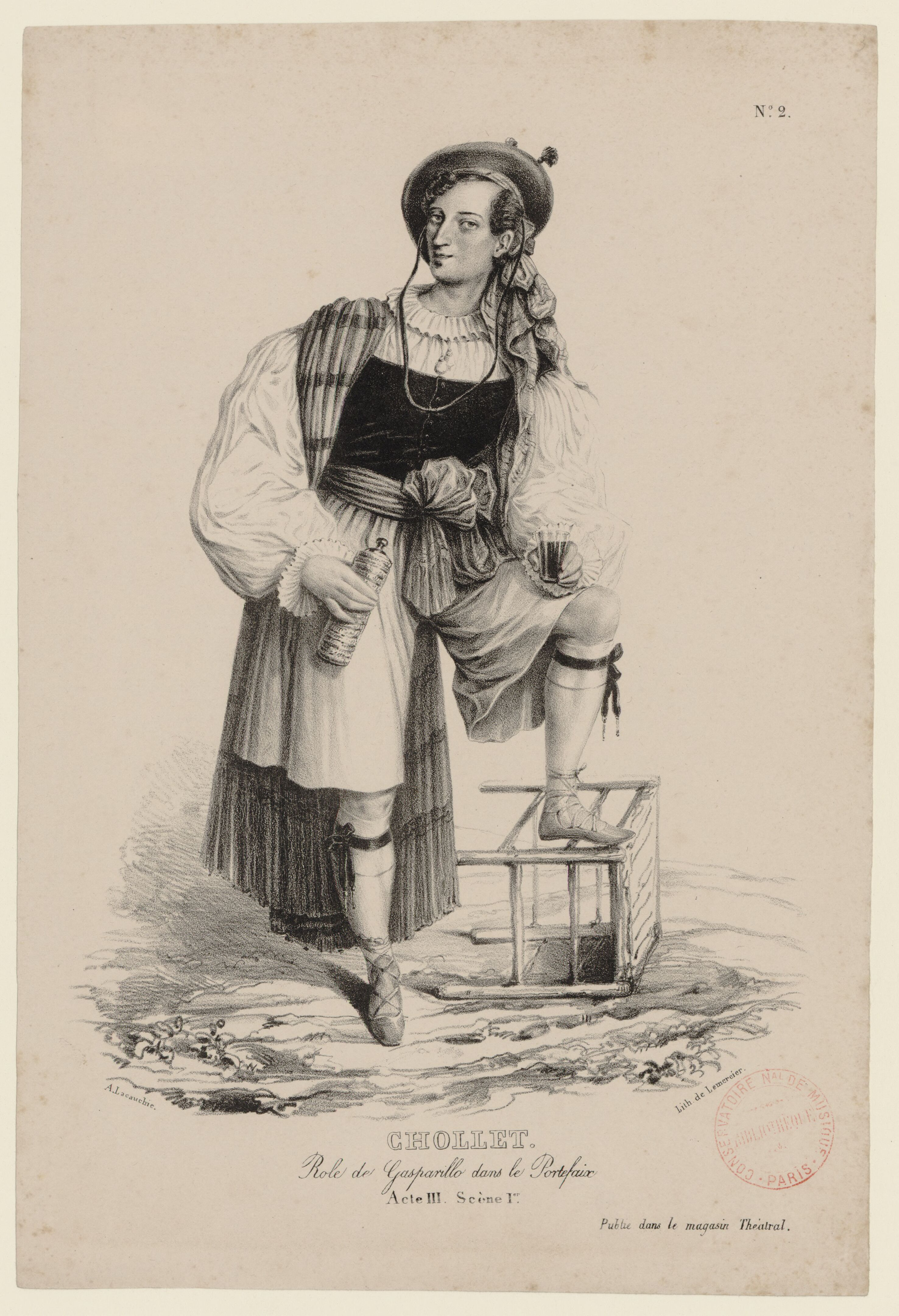 Jean-Baptiste Chollet, comédien chanteur (opéra-comique) en scène